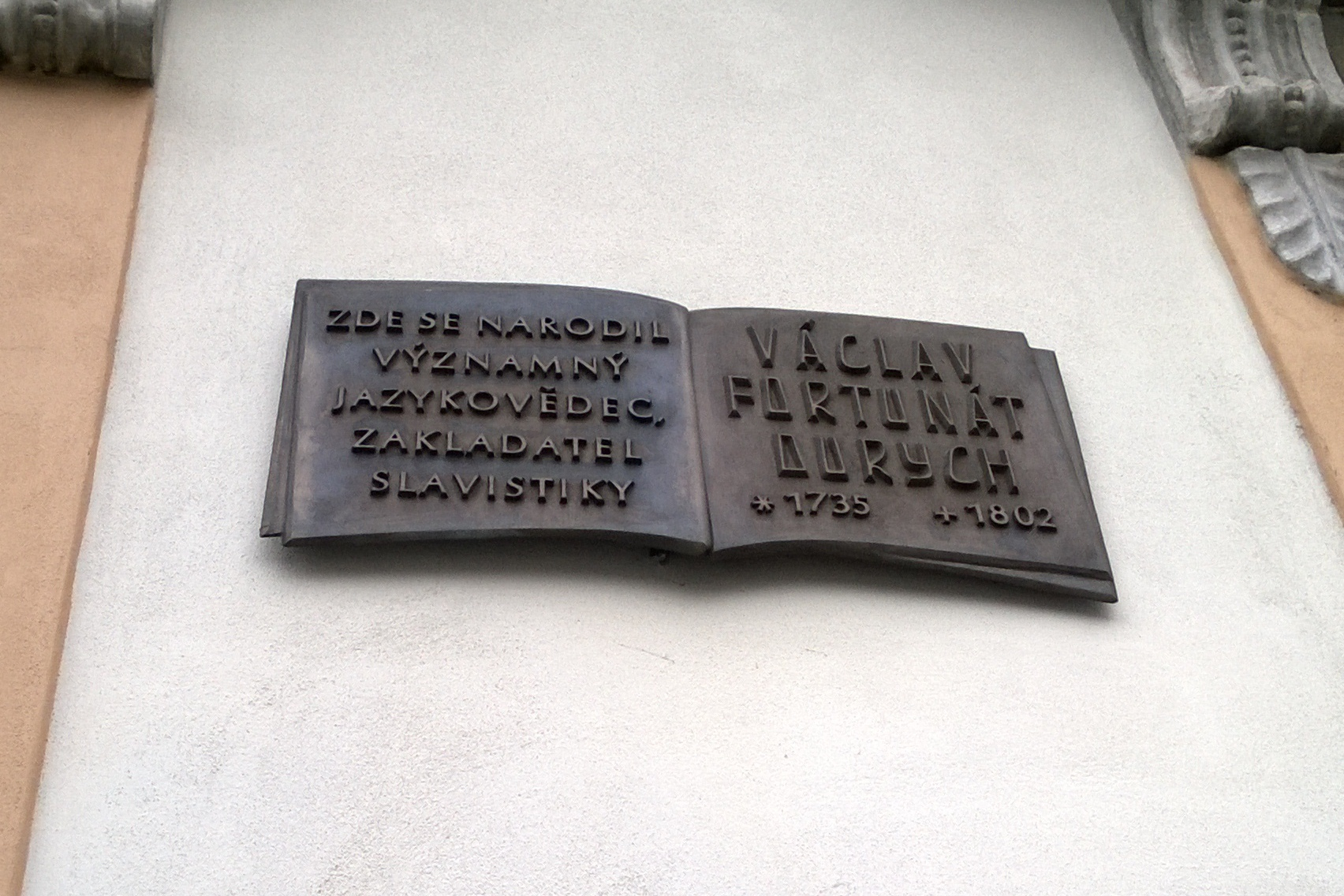 Pamětní deska na rodném domě Václava Fortunáta Durycha. Turnov, náměstí Českého ráje (u ulice Markova), dnešní čp. 24.